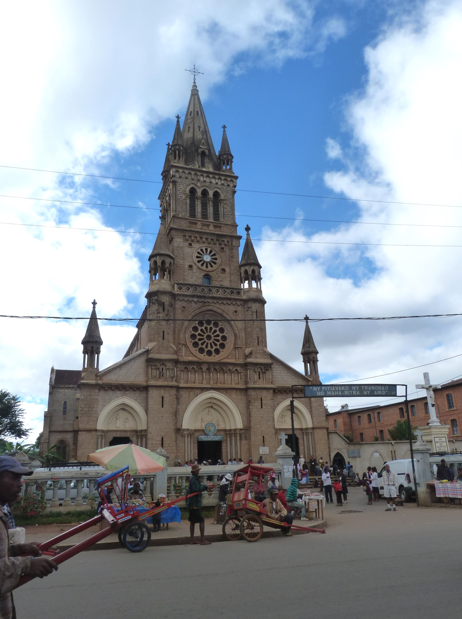 Cathédrale Notre-Dame de la Salette, Antsirabe, Madagascar.